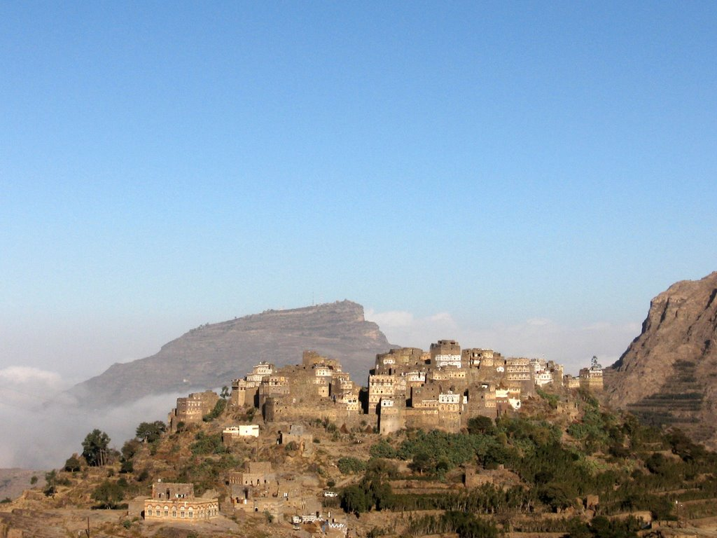 Al Hajjara